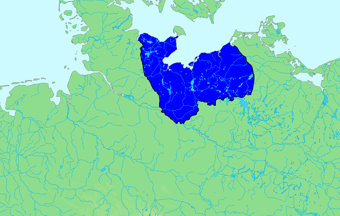 Siedlungsgebiet der Abodriten.Grenzziehung angelehnt an: Michael Müller-Wille: Zwischen Starigard/Oldenburg und Novgorod. Beiträge zur Archäologie west- und ostslawischer Gebiete im frühen Mittelalter. (= Studien zur Siedlungsgeschichte und Archäologie der Ostseegebiete. Bd. 10), Wachholtz, Neumünster 2011, ISBN 978-3-529-01399-7. S. 46 ff.Topographische Grundkarte (Küstenlinien, Flüsse) von demis (gemeinfrei [1])